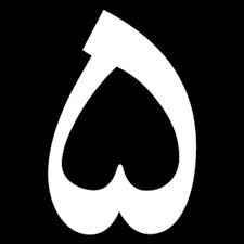 نشان برنامهٔ در ساعت ۵ عصر